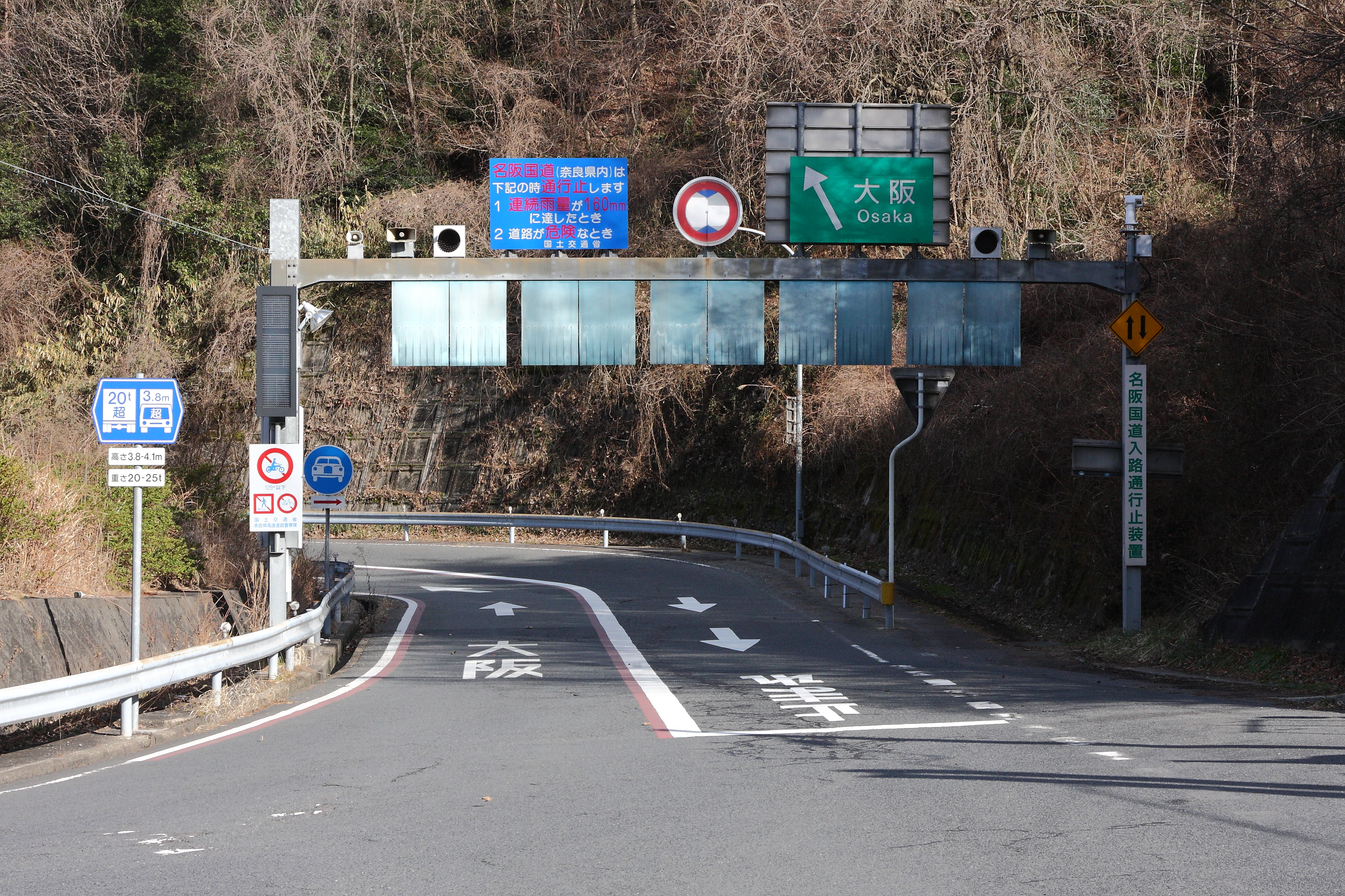 名阪国道 神野口インターチェンジ 天理方面出入口 奈良県山辺郡山添村